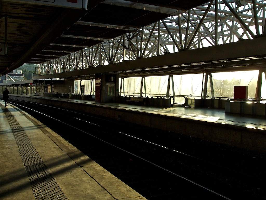 Tipo: ES Estação Satélite Local: Lisboa Linha de Cintura, PK 4 Data e hora: 9 de Julho de 2008 20h22